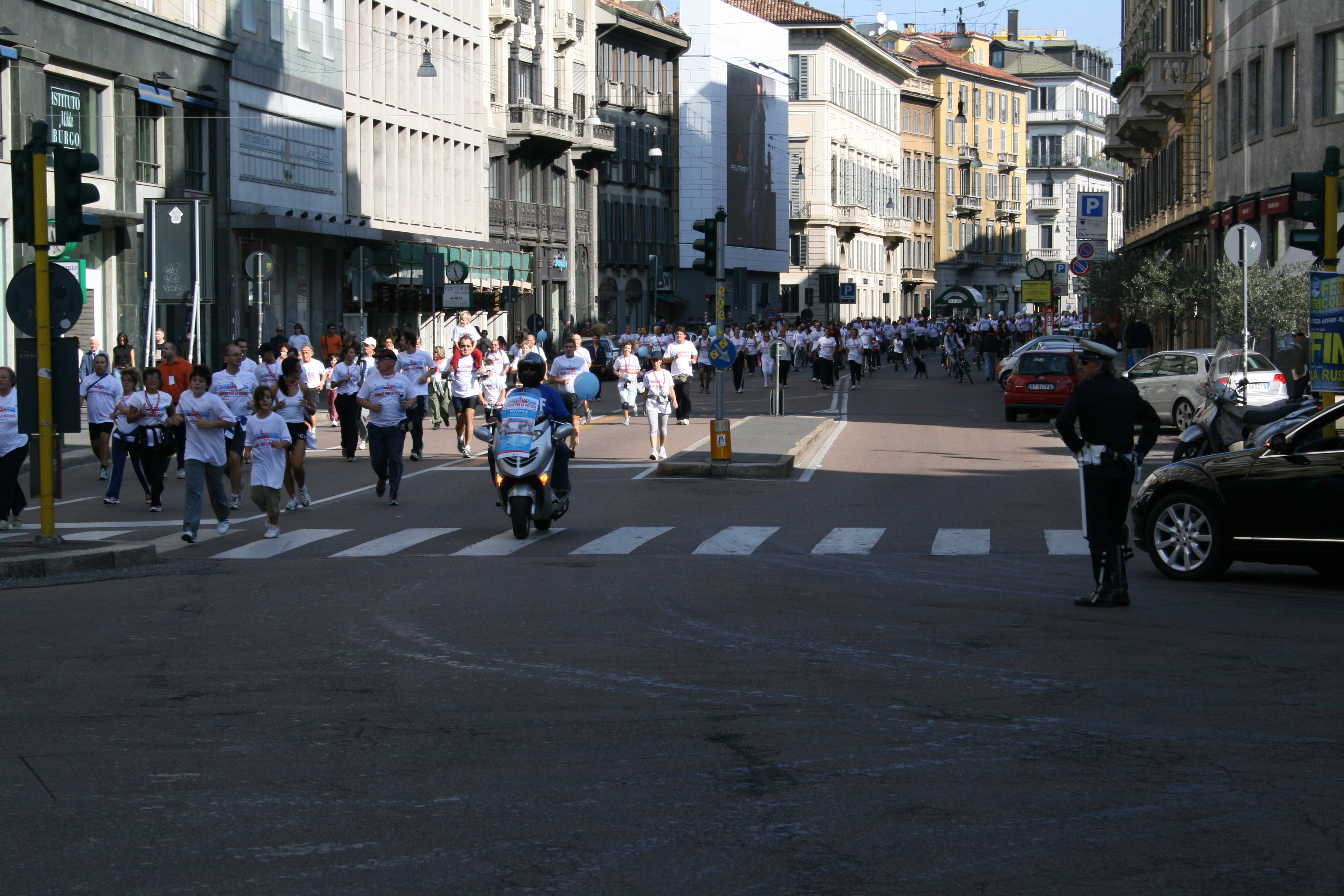 Terry Fox Run in corso Venezia